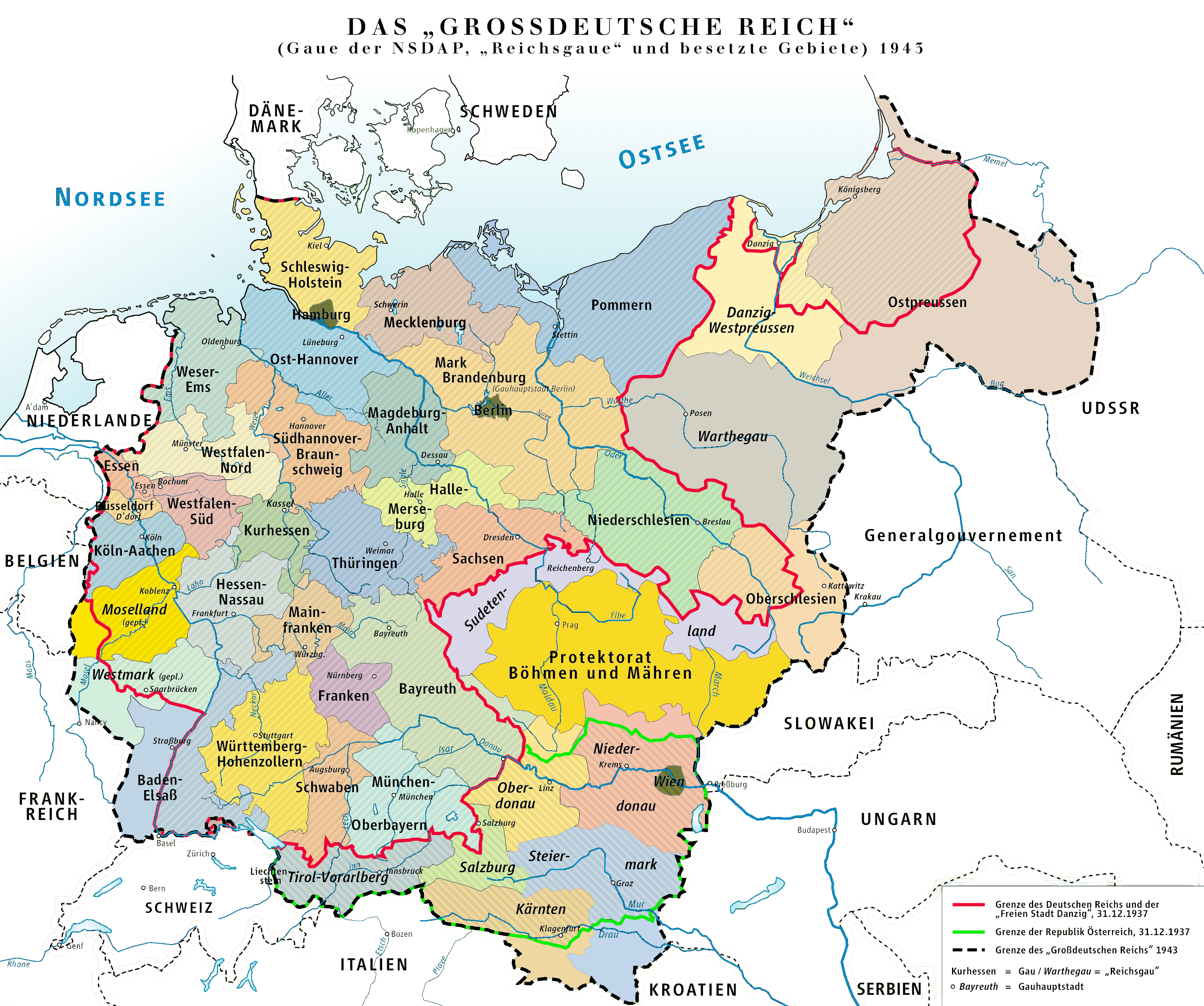 Karte des »Großdeutschen Reiches« 1943 / Map of »Großdeutsches Reich«/»Großdeutschland« ("Greater German Empire"/"Greater Germany") 1943 / Mapa Wielkiej Rzeszy Niemieckiej